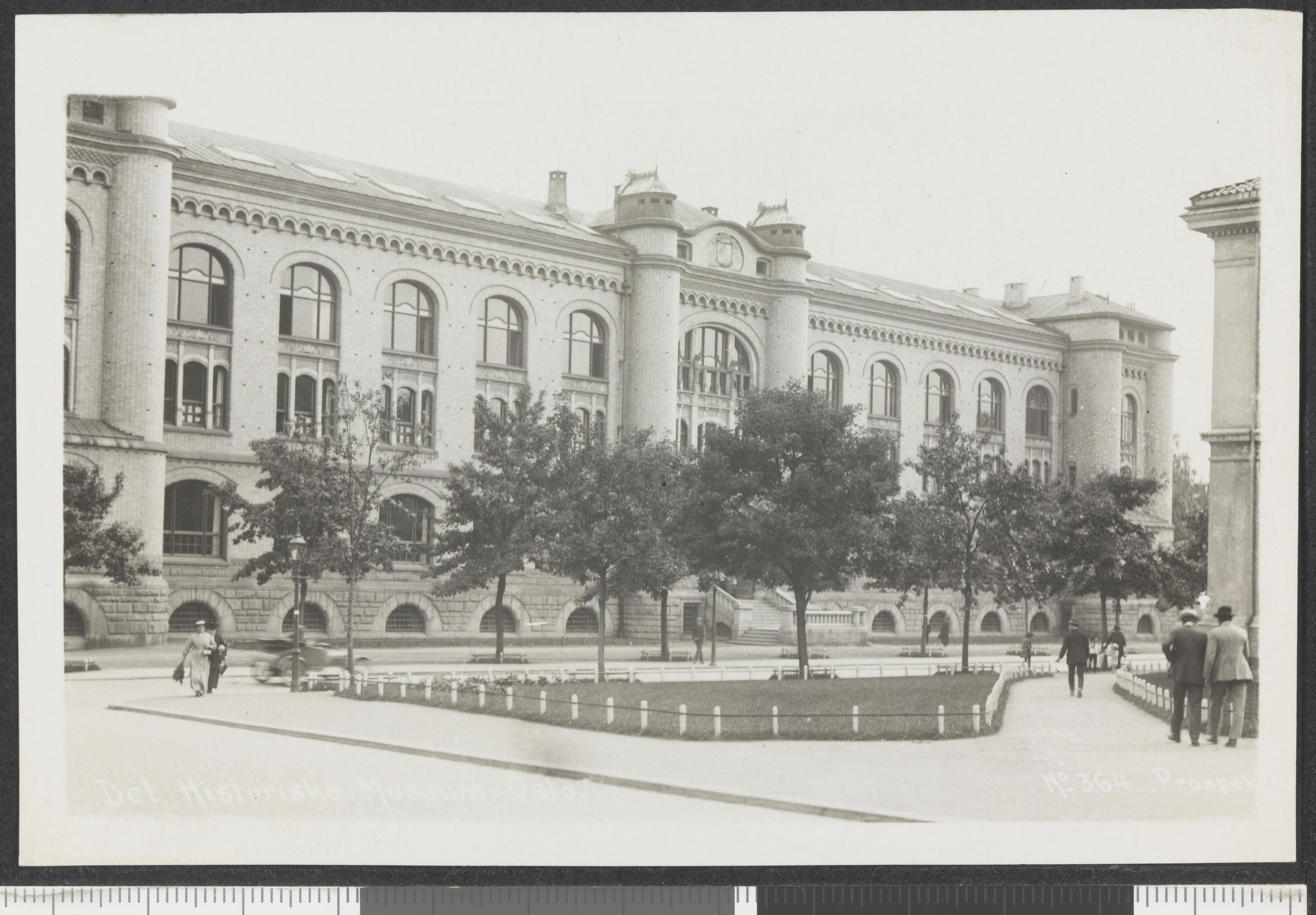 Bildet er hentet fra Nasjonalbibliotekets bildesamling Tulinløkka, Oslo, Oslo